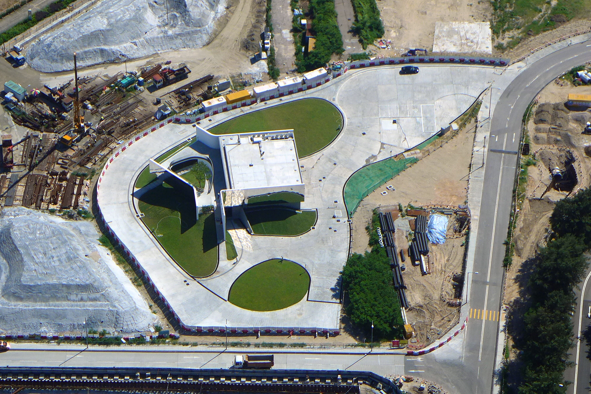 M pavilion